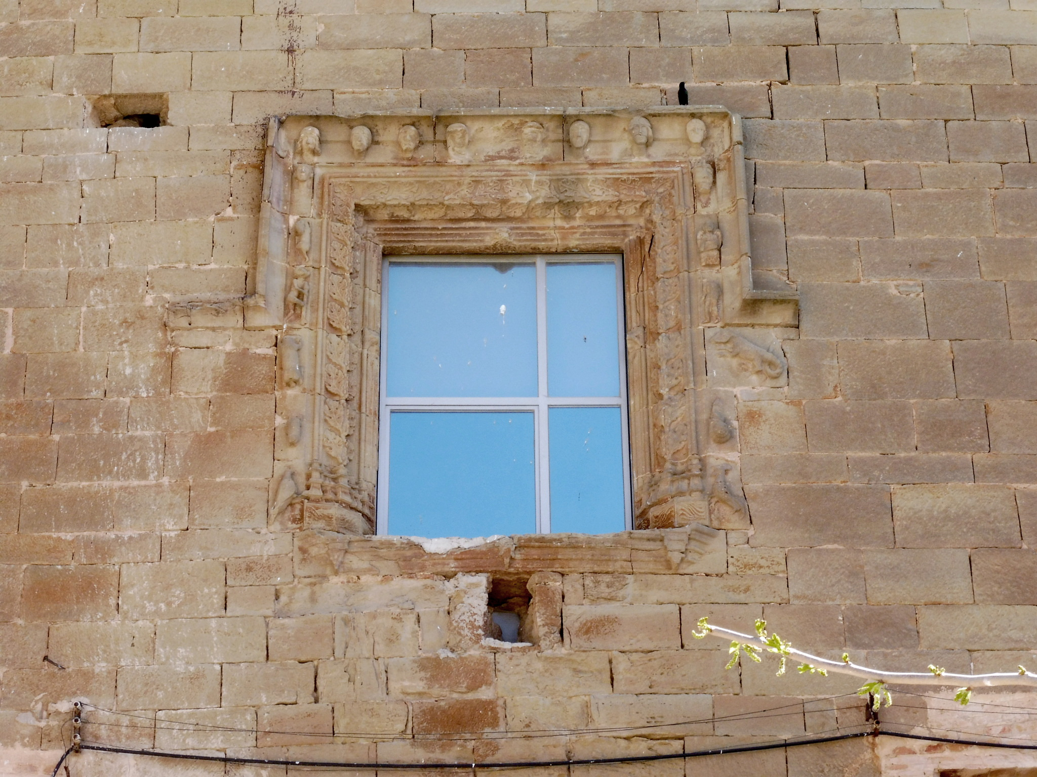 Castell de Concabella (els Plans de Sió): finestra a la façana de ponent